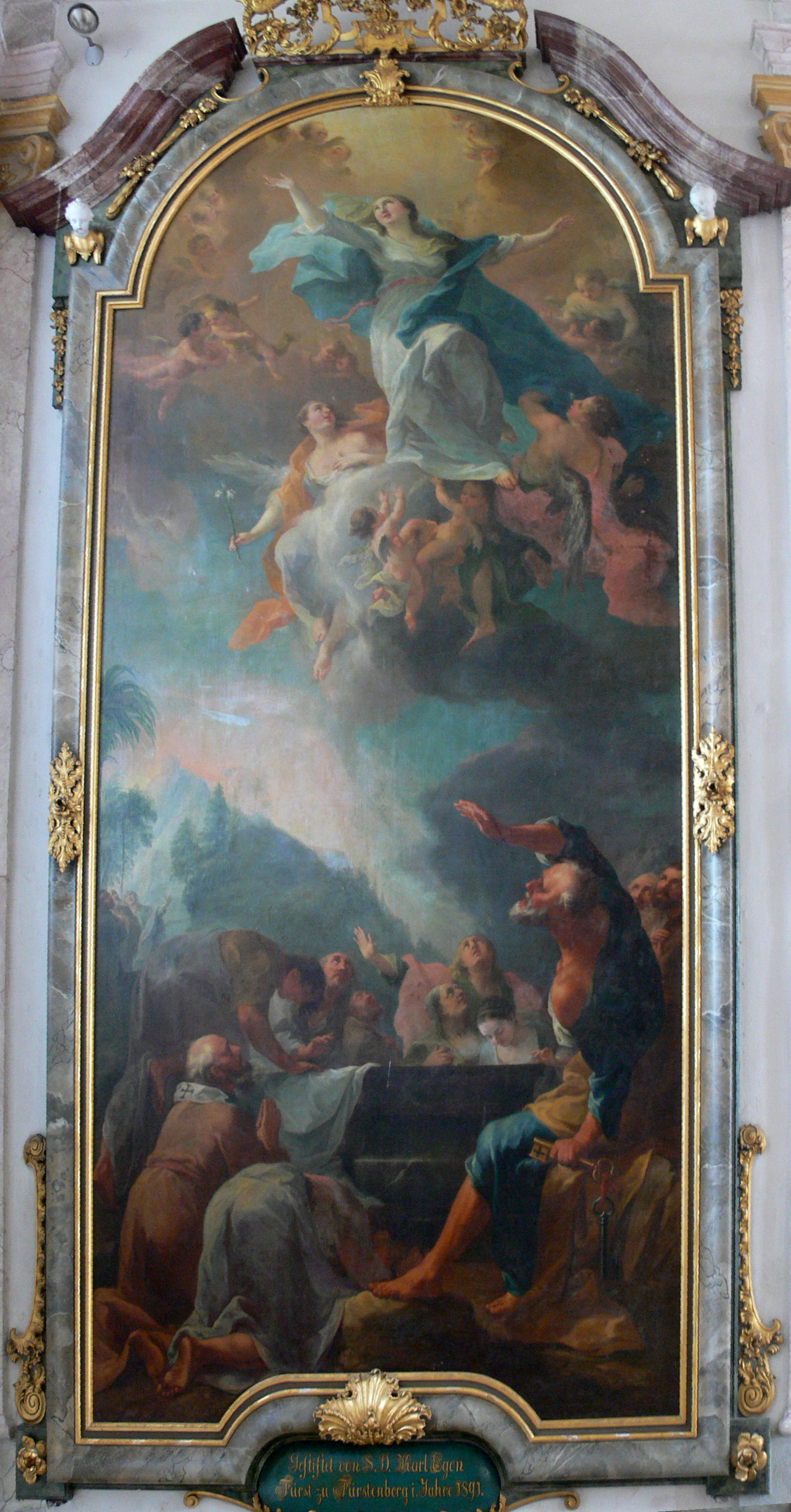 Wallfahrtskirche Maria zum Berge Karmel, Baitenhausen, Stadt Meersburg, Bodenseekreis Joseph Esperlin: "Mariä Himmelfahrt", 1764/1765, aus der Schlosskapelle Heiligenberg, gestiftet 1893 von Karl Eugen Fürst zu Fürstenberg